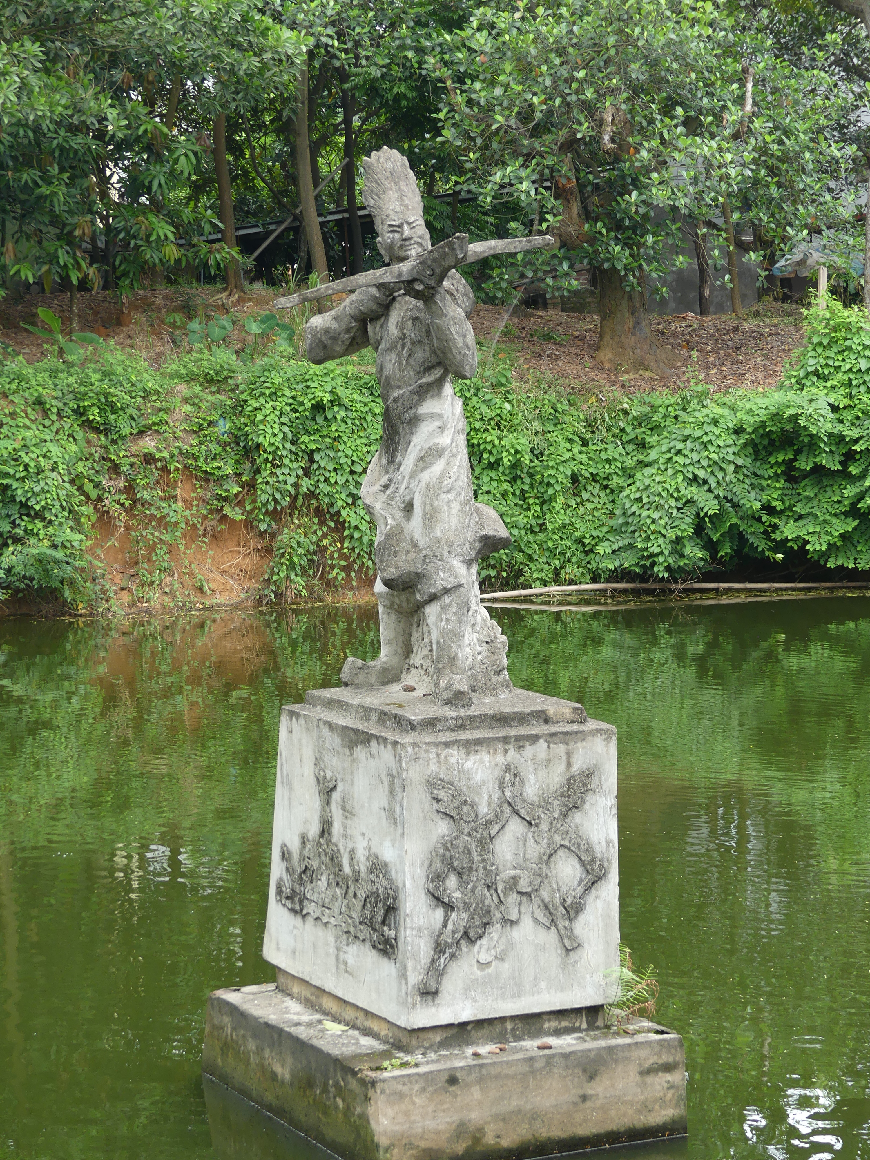 Statue of Cao Lo, builder of An Duong Vuong's magic crossbow, in Co Loa, Dong Anh District, Hanoi, Vietnam